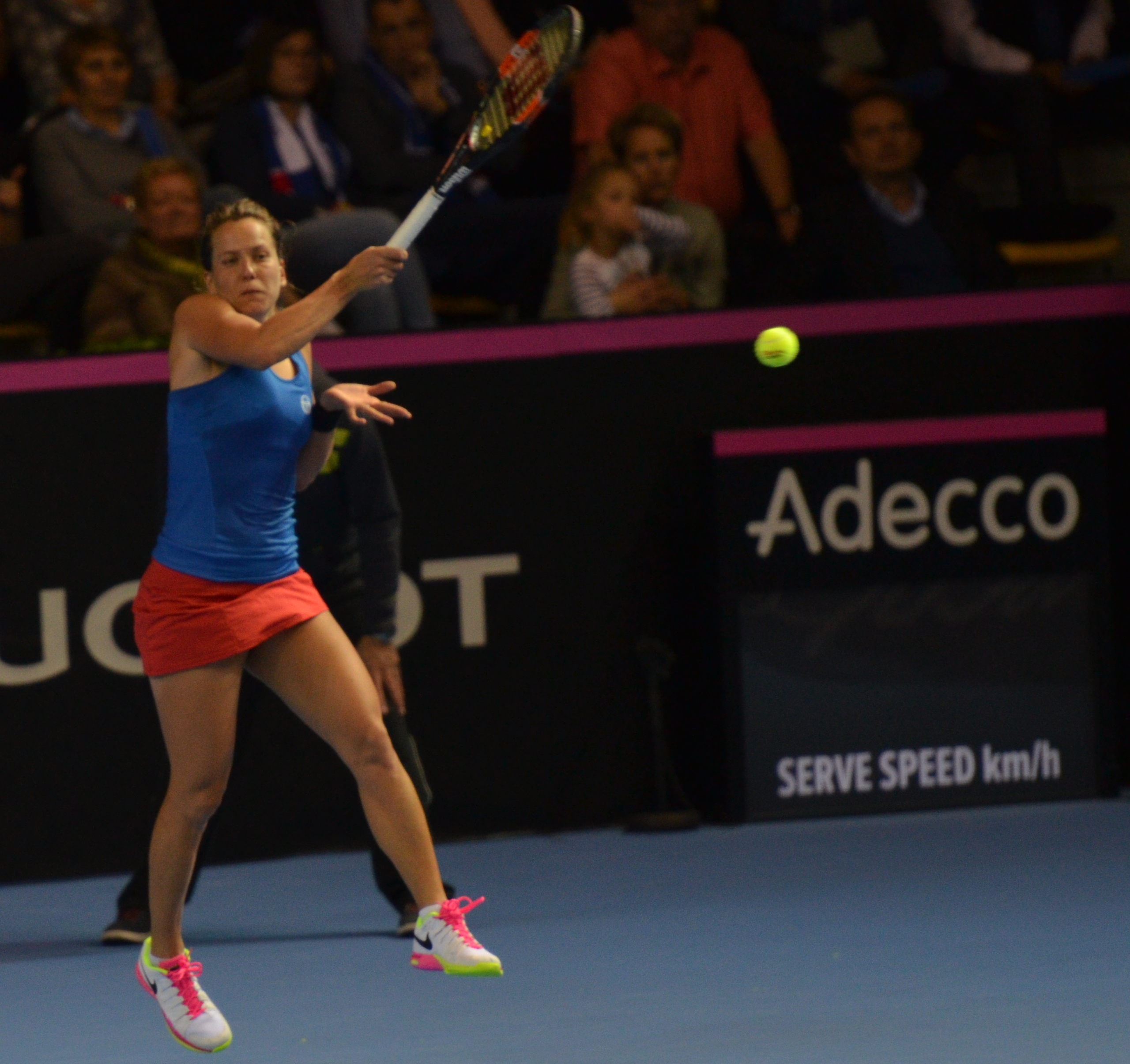 PPP_3355